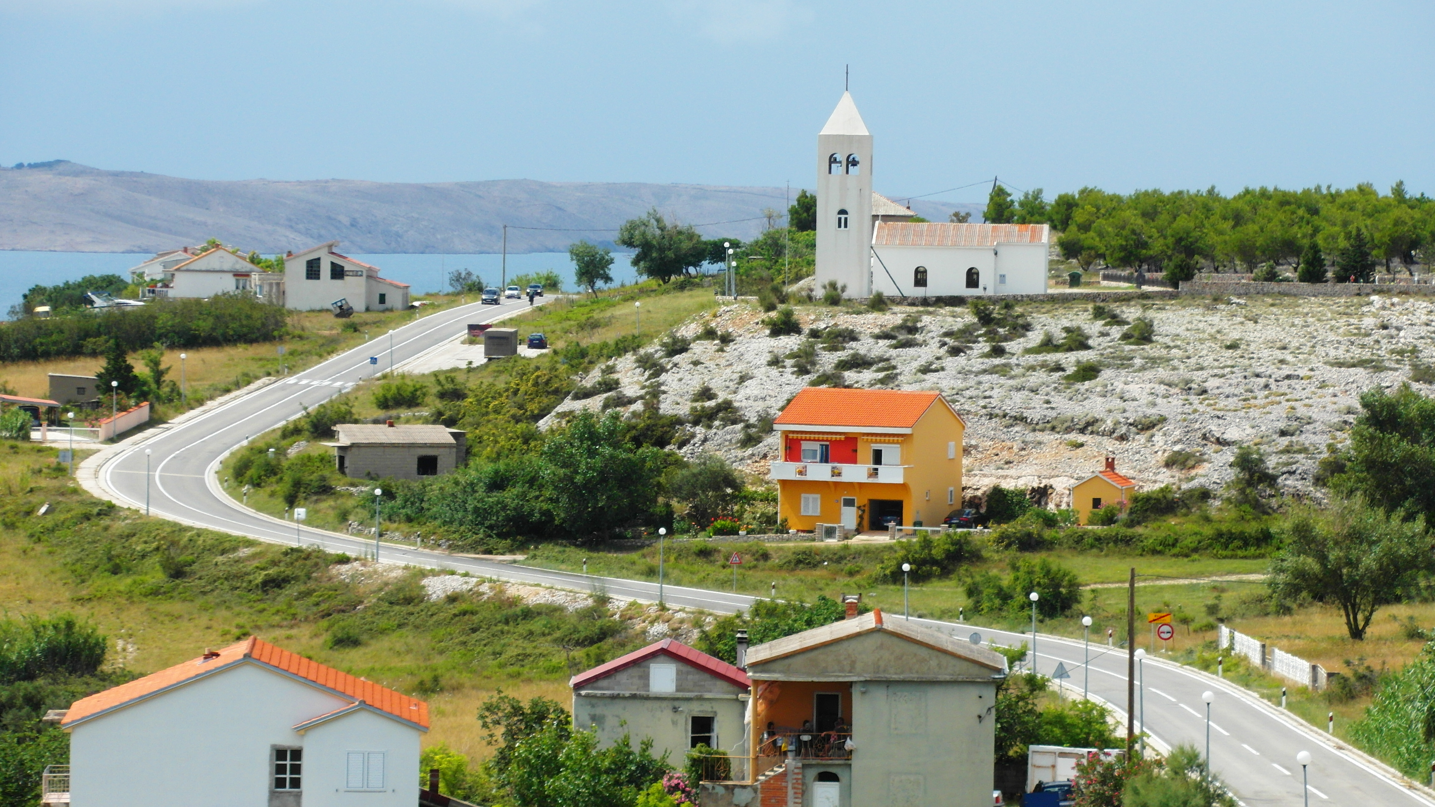 JADRANSKÁ MAGISTRÁLA - ADRIATIC MAIN LINE